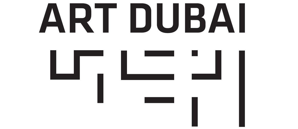 Art Dubai logo